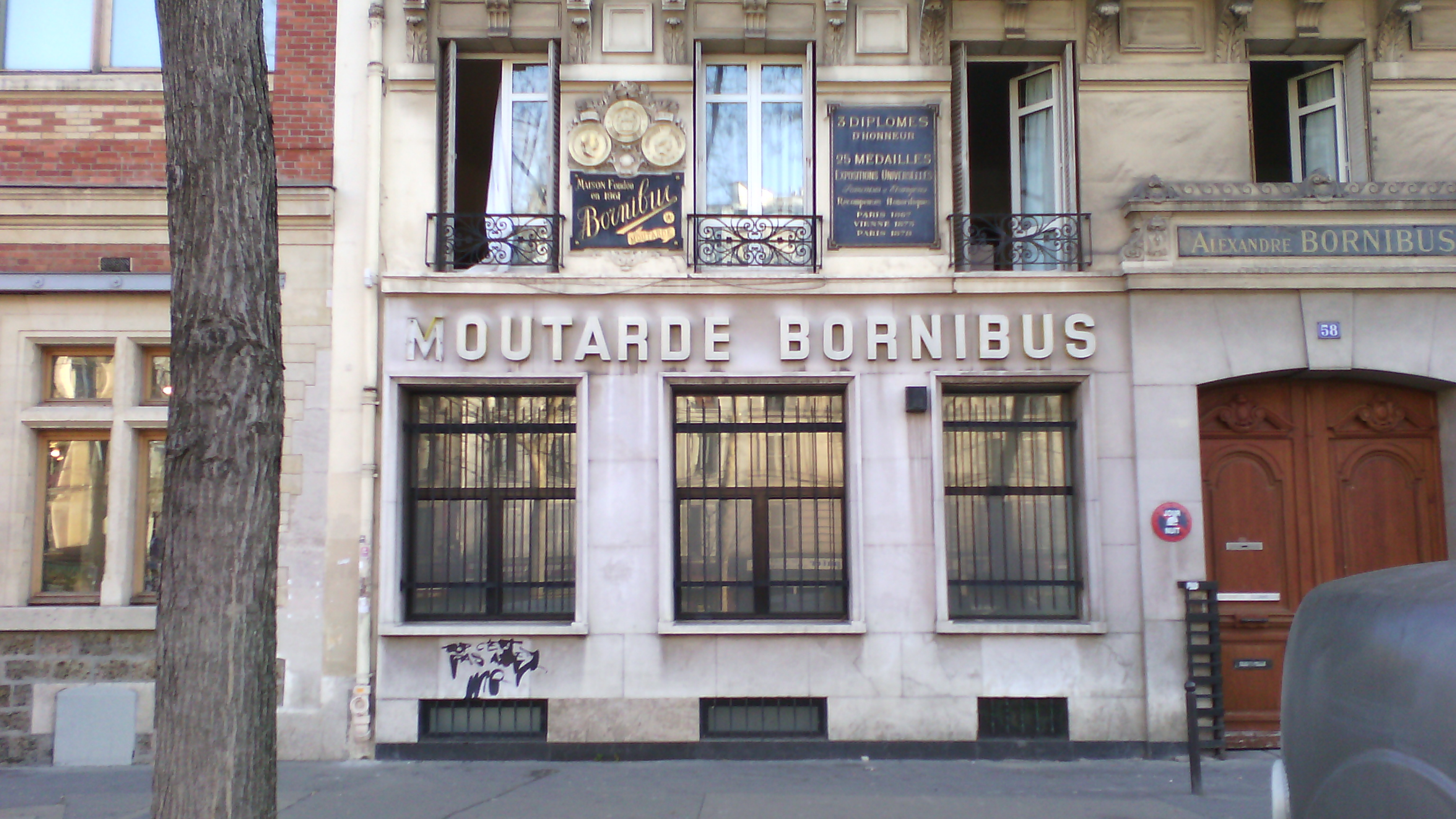 Siège de la maison Bornibus (Bd de la Vilette, Paris XIXeme)